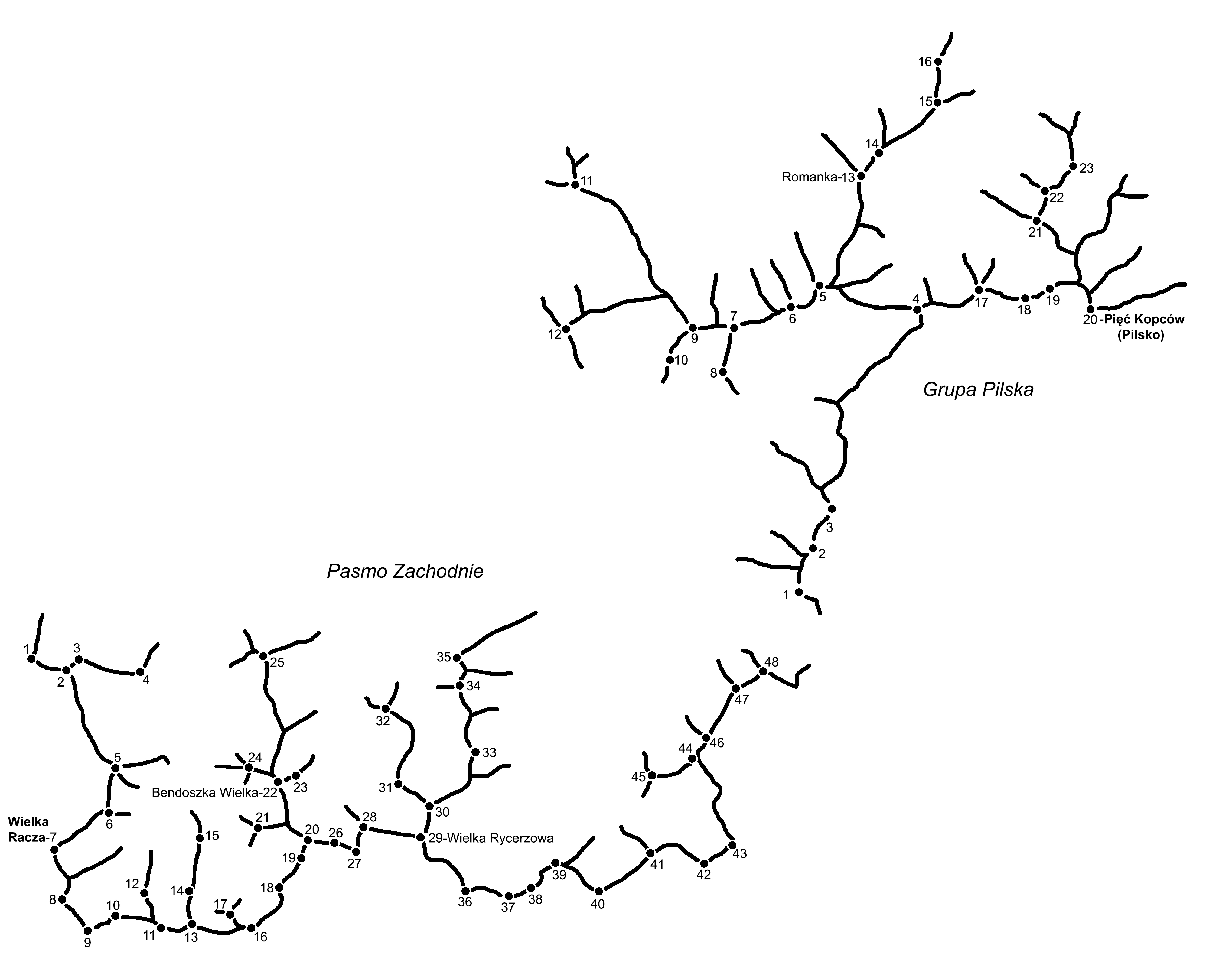 Schemat Beskidu Żywieckiego Zachodniego i Grupy Pilska